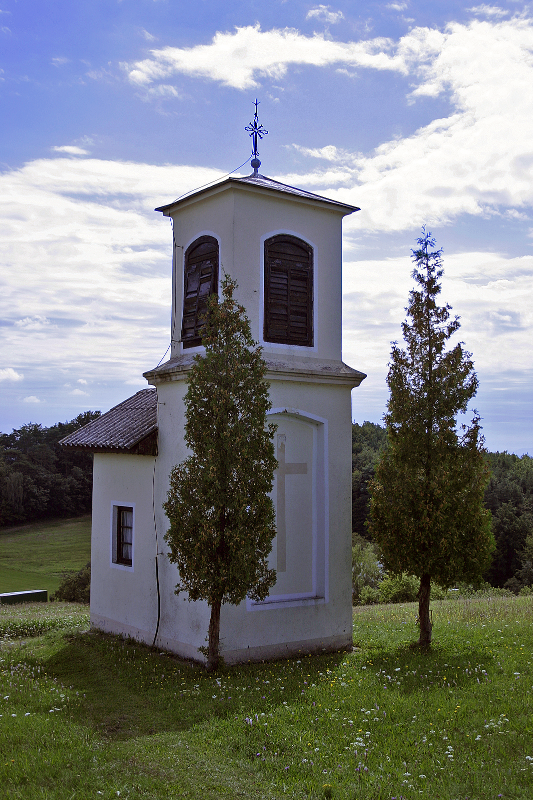 »Žilavcova« kapela, Vadarci. »Žilavec« chapel, Vadarci. »Žilavec« Kapelle, Vadarci.